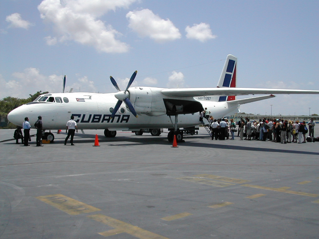 Cubana Antonov An-24 at Cancun Airport